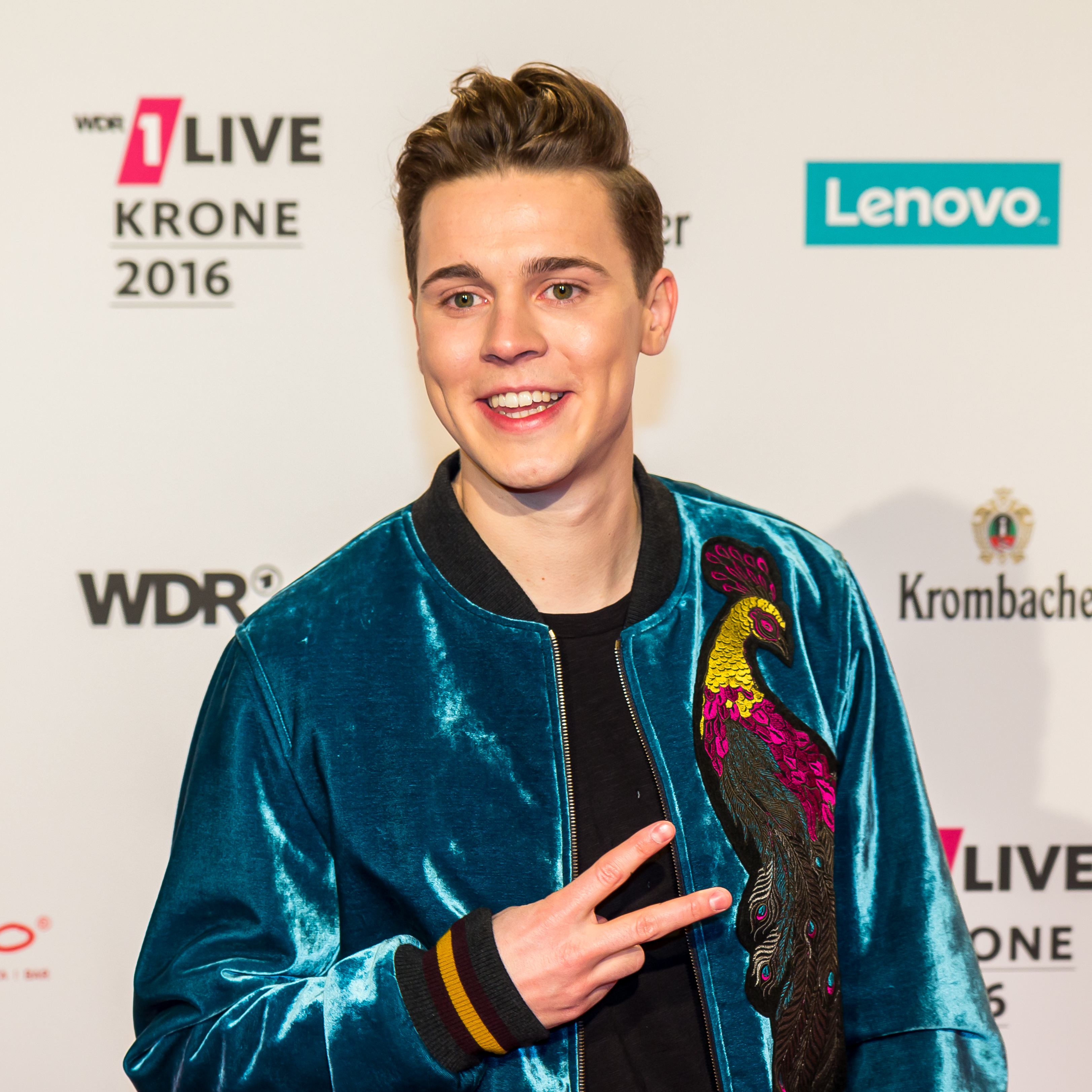 1LIVE Krone 2016 - 1700 - Roter Teppich - Felix Jaehn